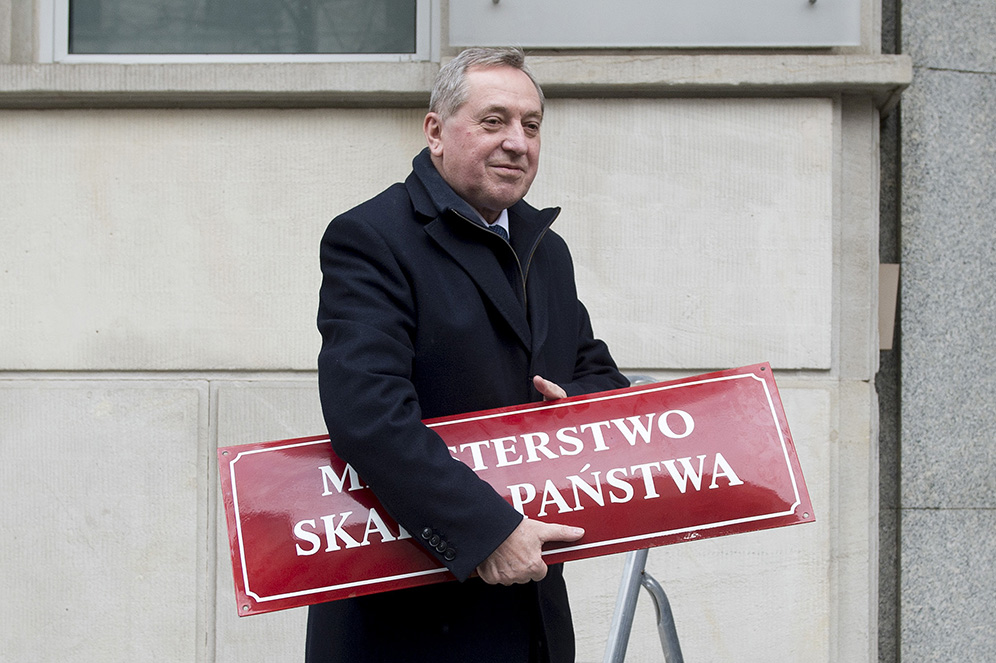 Henryk Kowalczyk, likwidacja Ministerstwa Skarbu Państwa.